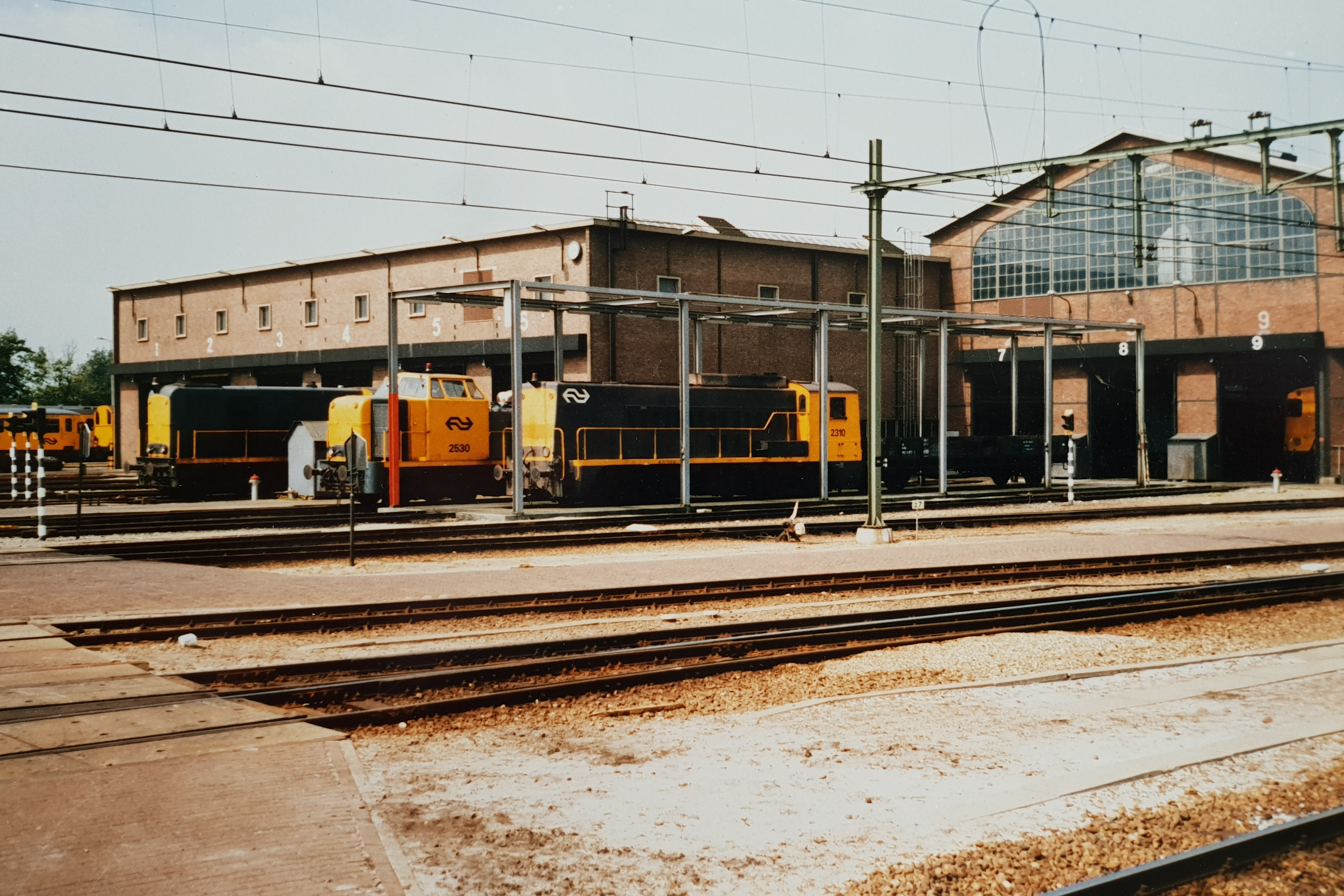 Werkplaats Zwolle in 1987 (foto: Daniel van der Ree)